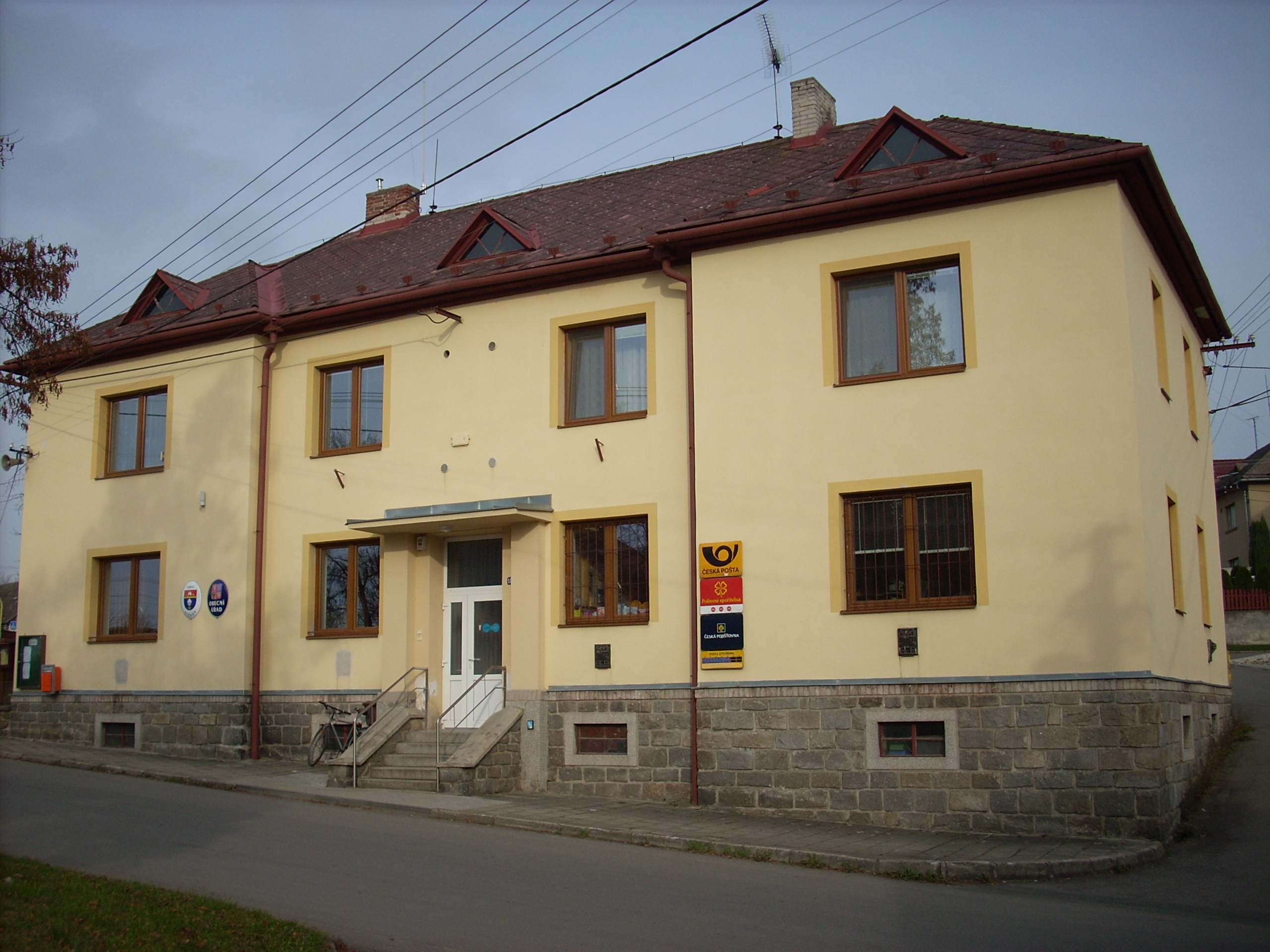 Nížkov, obecní úřad